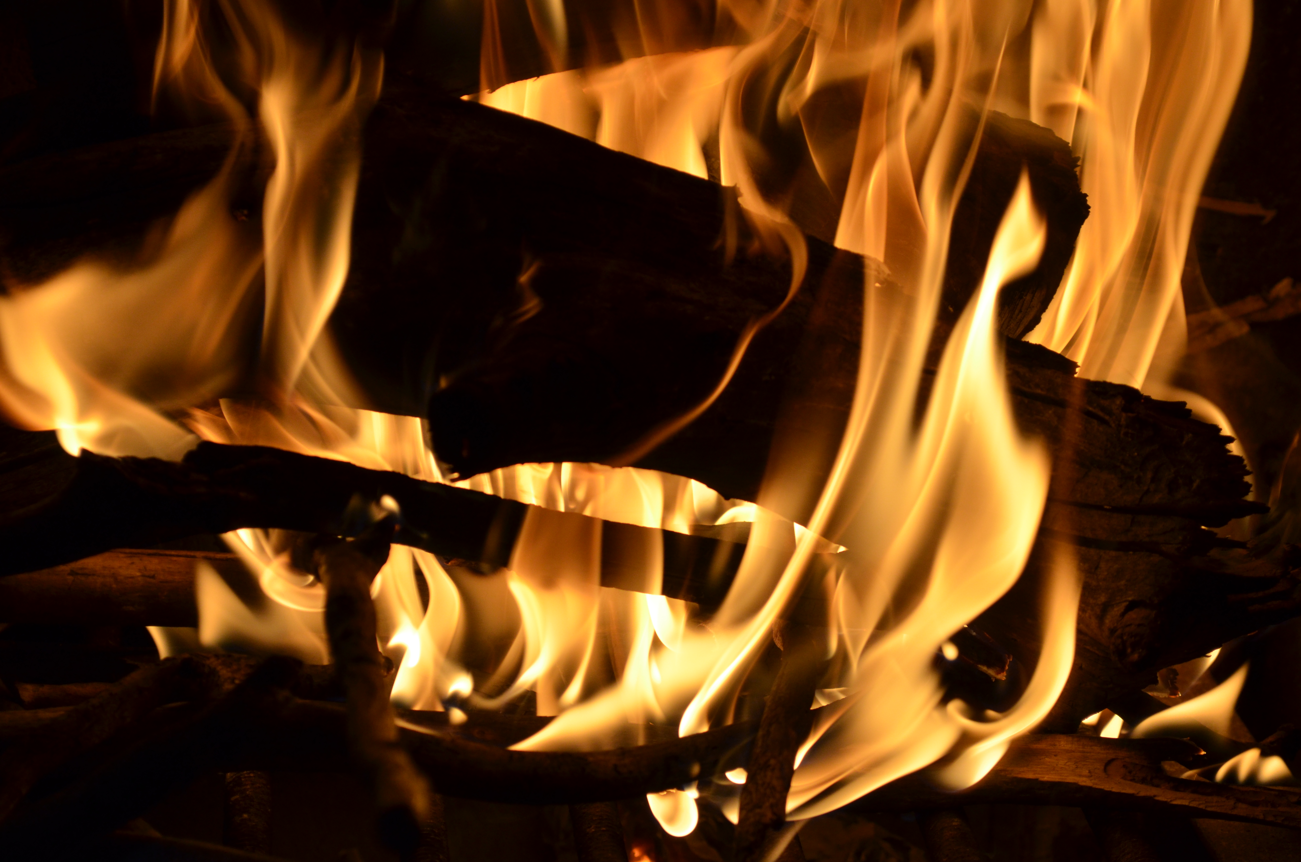 Fotografia